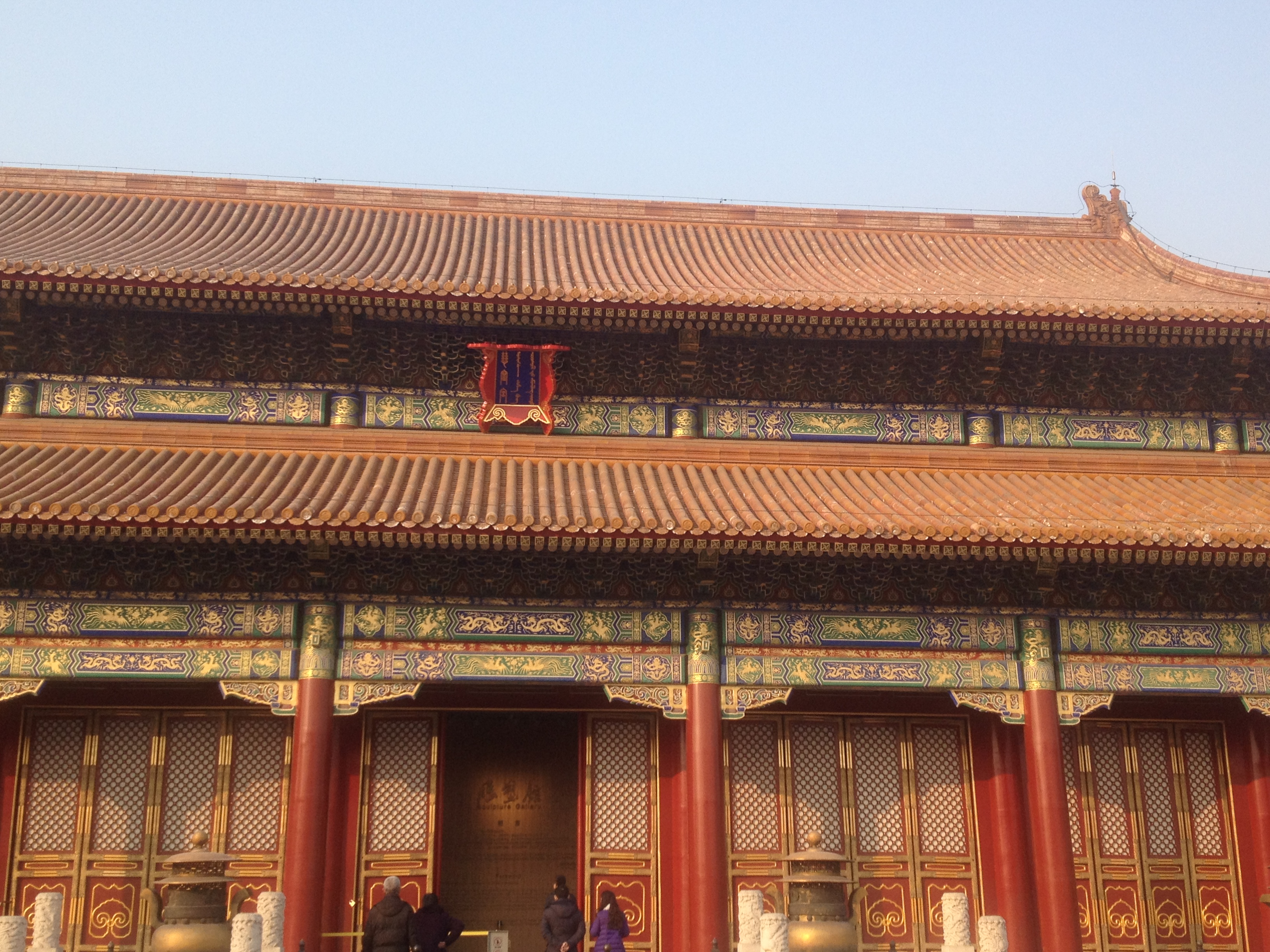 北京故宫中的慈宁宫